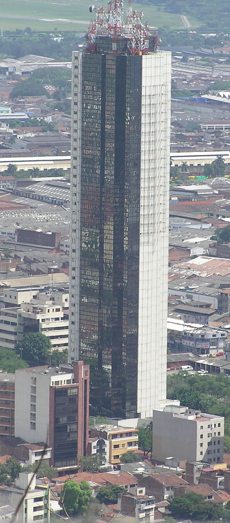 Torre de Cali, Santiago de Cali, Colombia